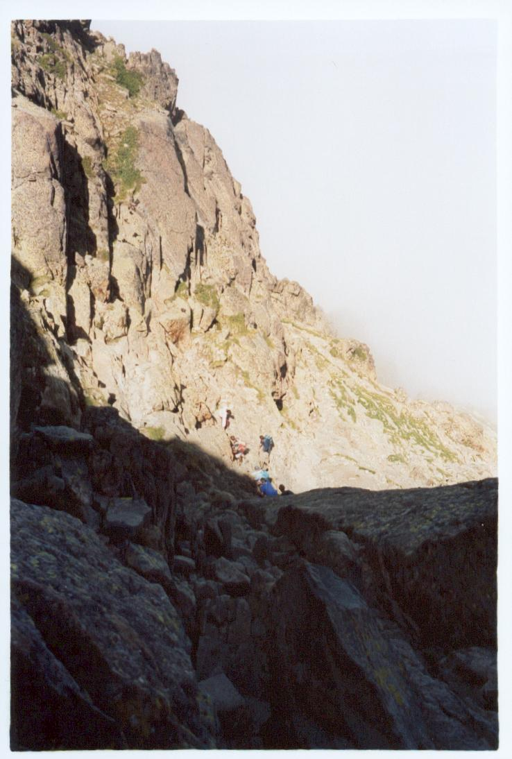 Subida al Middi d'Ossau